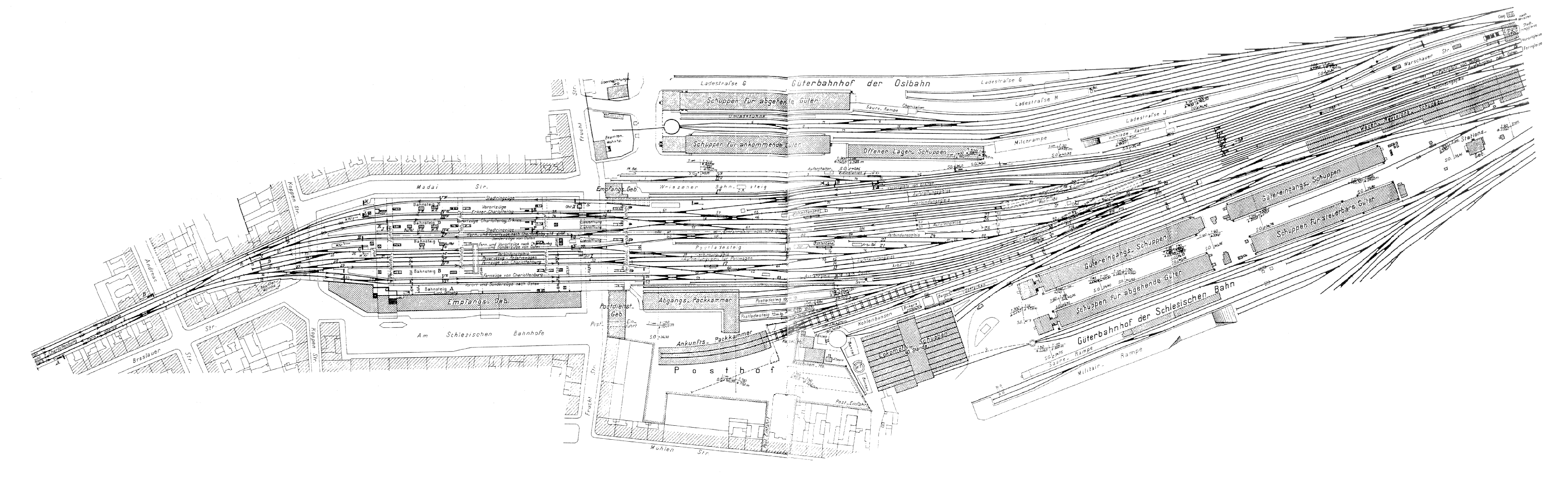 Gleisplan des Schlesischen und Wriezener Bahnhofs (nordöstlich gelegen) 1908. Namen des Schlesischen Bahnhofs: 1842 bis 1881 Frankfurter Bahnhof, 1881 bis 1950 Schlesischer Bahnhof, 1950 bis 1987 Ostbahnhof, 1987 bis 1998 Hauptbahnhof, seit 1998 Ostbahnhof.